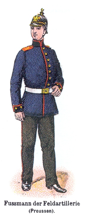 Preuss. Fussartillerist, Ordonannzanzug